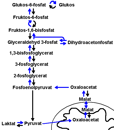 En schematisk bild över glukogenesen. Böjda pilar betyder att reaktionerna katalyseras av olika enzymer i glykolysen och glukoneogenesen medan raka pilar använder samma enzym.